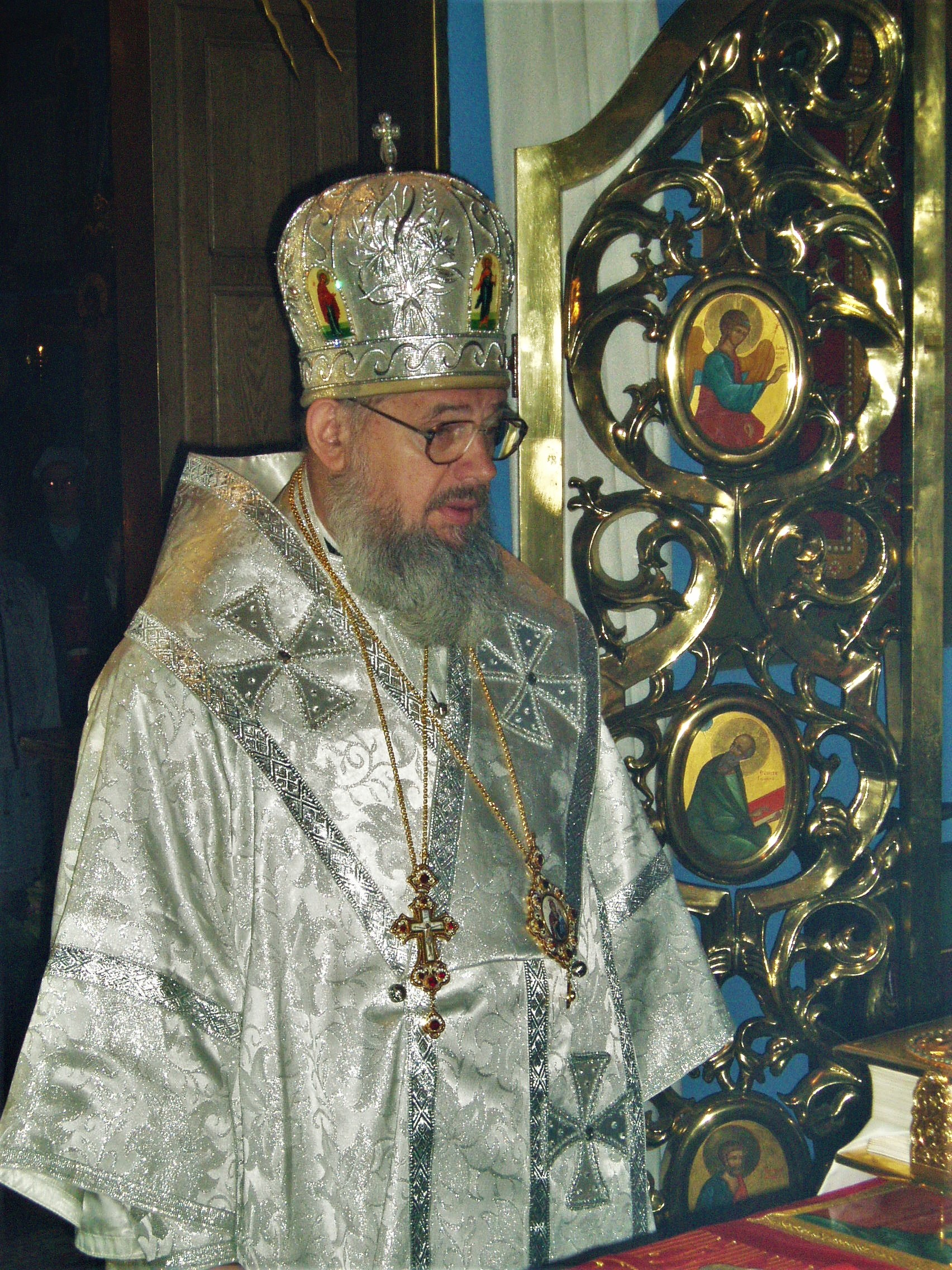 Prawosławny arcybiskup wrocławski i szczeciński Jeremiasz.